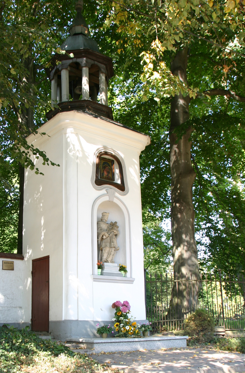 Słoków – wieś w Polsce położona w województwie opolskim, w powiecie prudnickim, w gminie Lubrza. Kapliczka-dzwonnica przy folwarku, XVIII w.